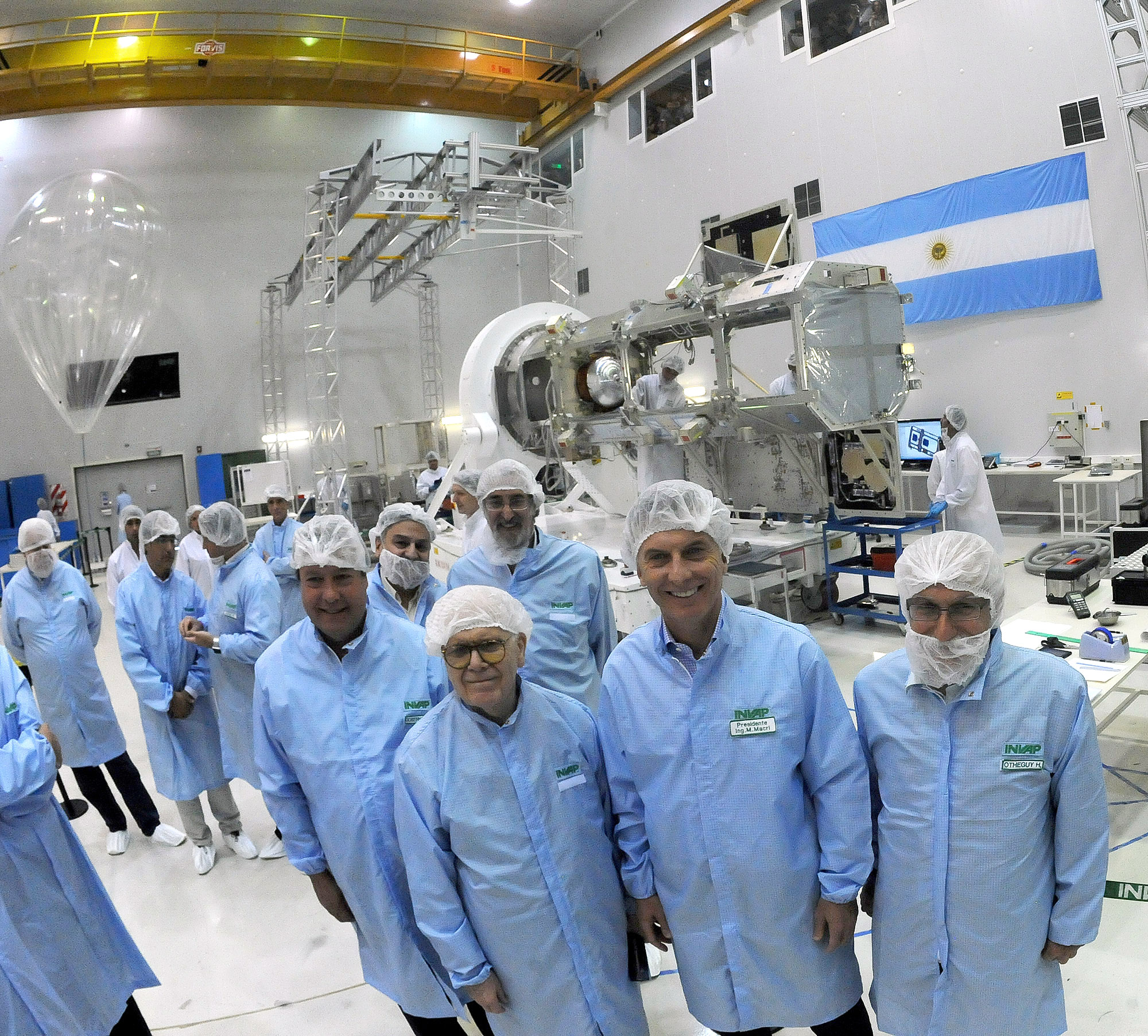 Mauricio Macri junto a Conrado Varotto y otras destacadas personalidades en la sala limpia de INVAP